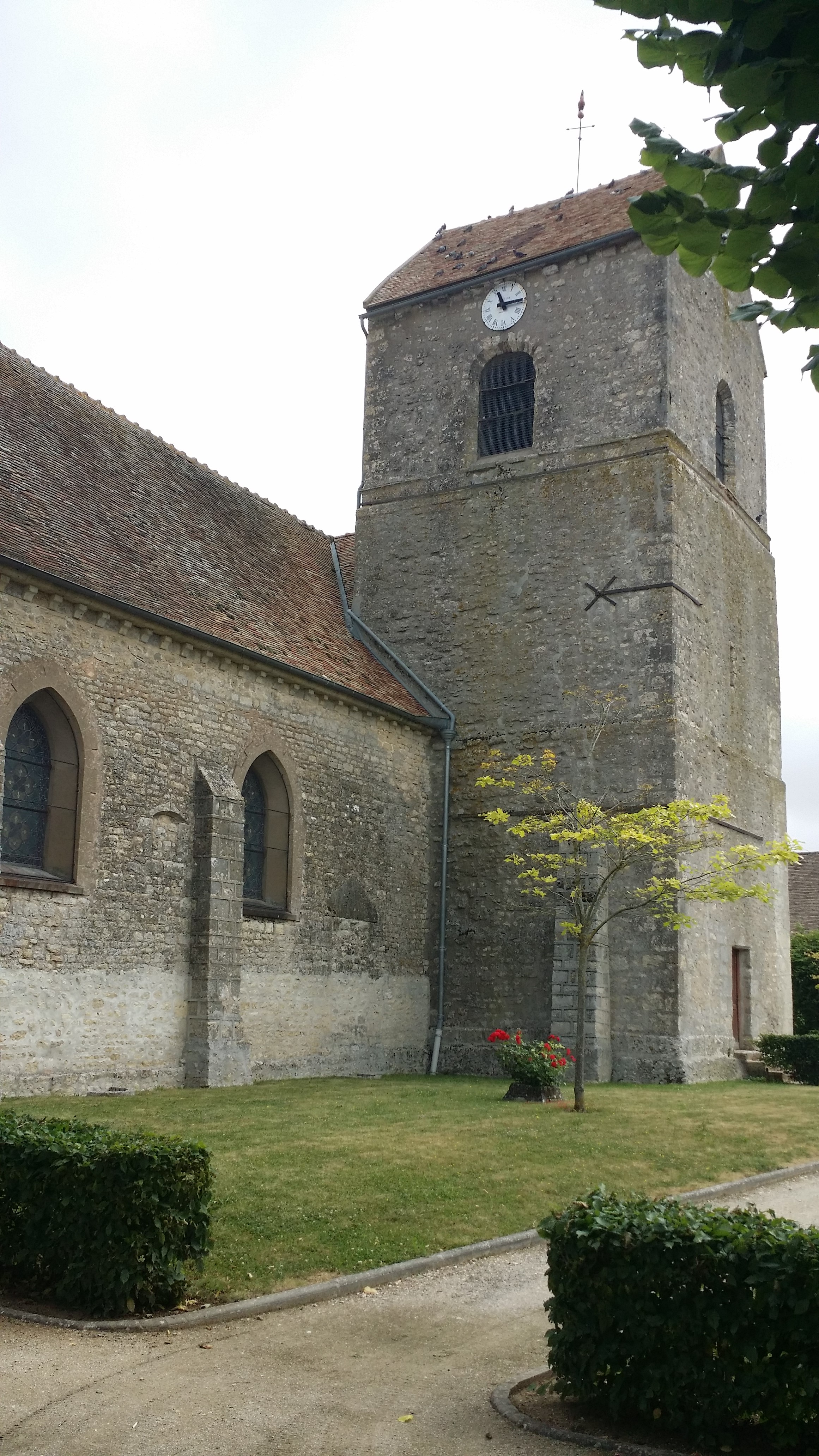 Visite de Gouillons (28), Eglise